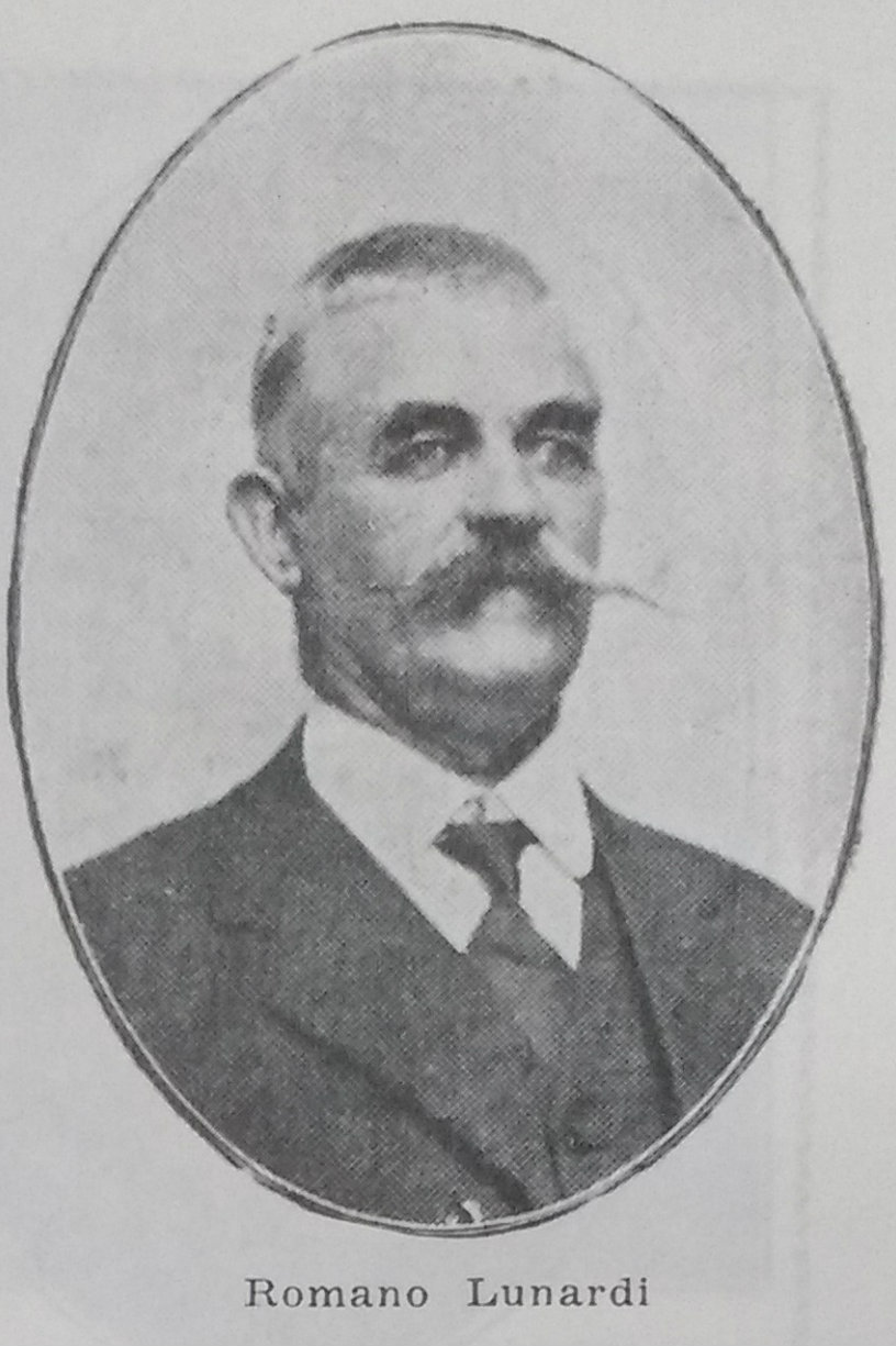 Cinquantenario della Colonizzazione Italiana nel Rio Grande del Sud